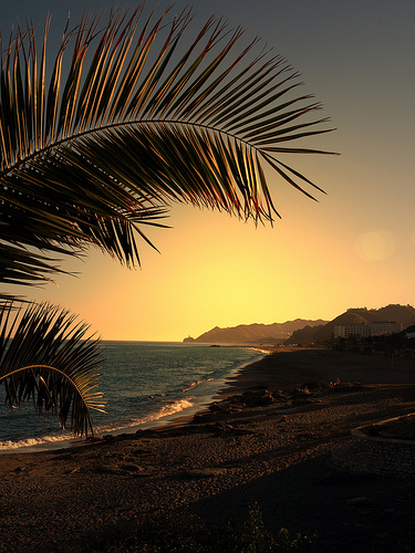 Cabo de Gata, el lugar más seco de Europa. Una bonita puesta de sol.